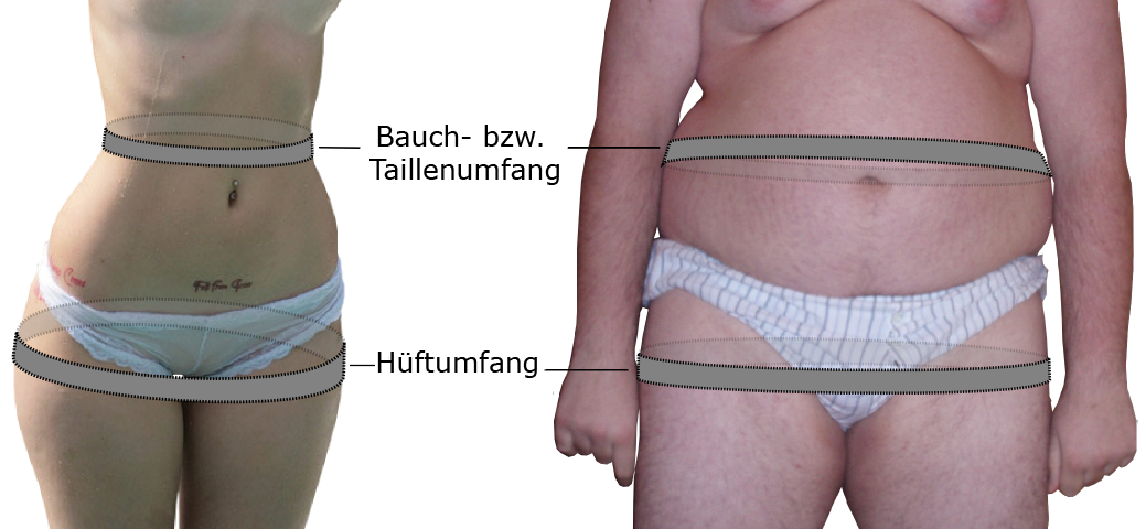 Darstellung an welcher Stelle des Körpers Taillen- und Hüftumfang gemessen werden